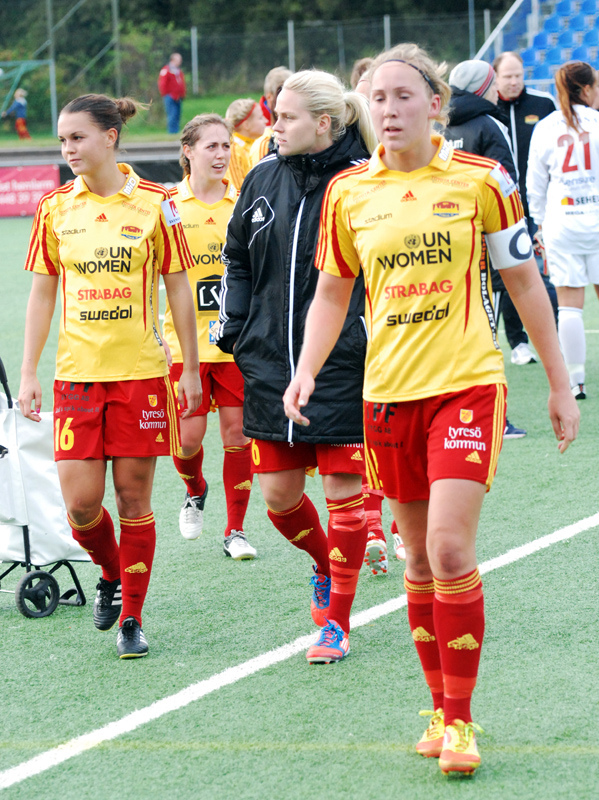 Karin Lissel